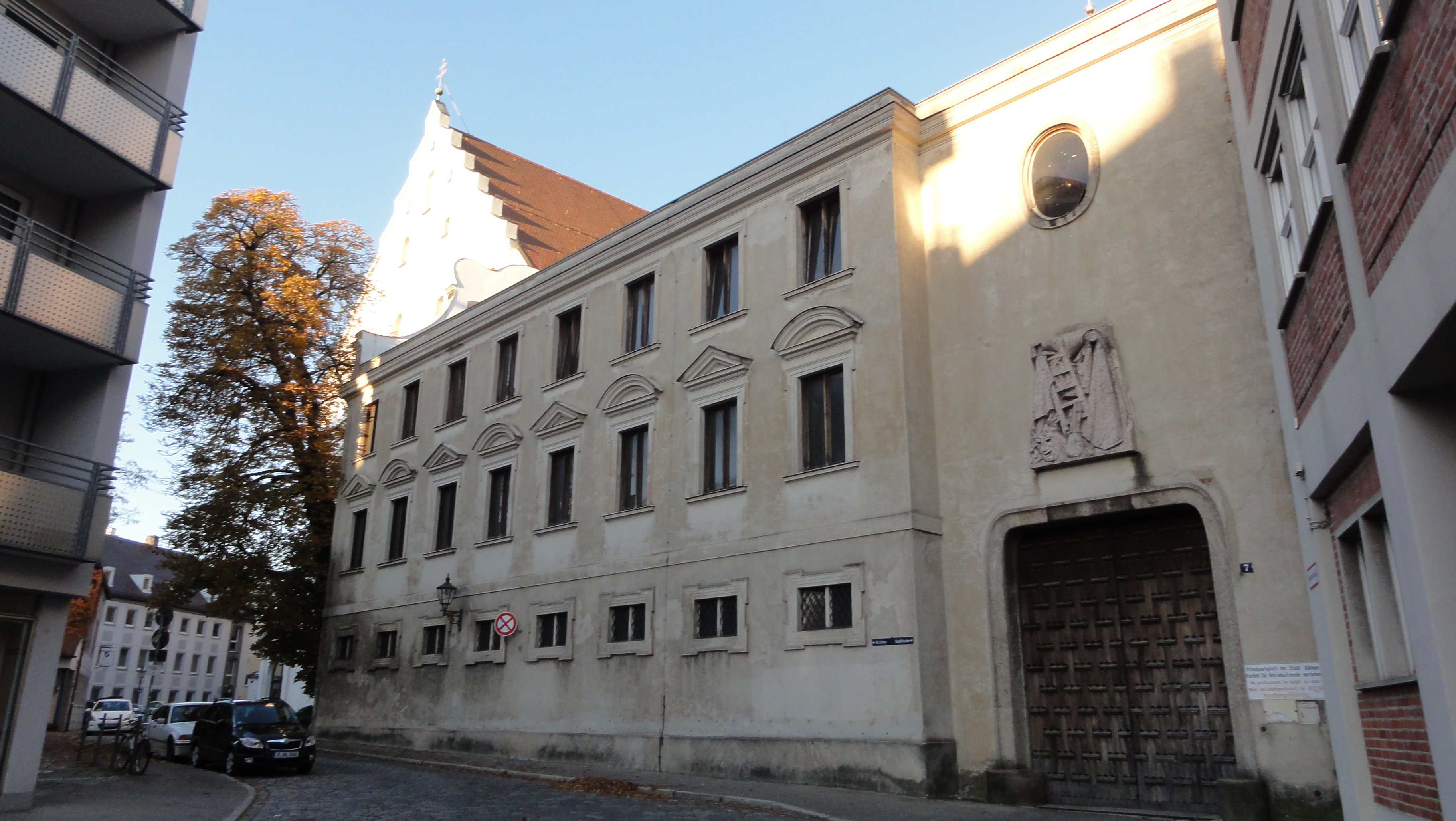 Augsburg